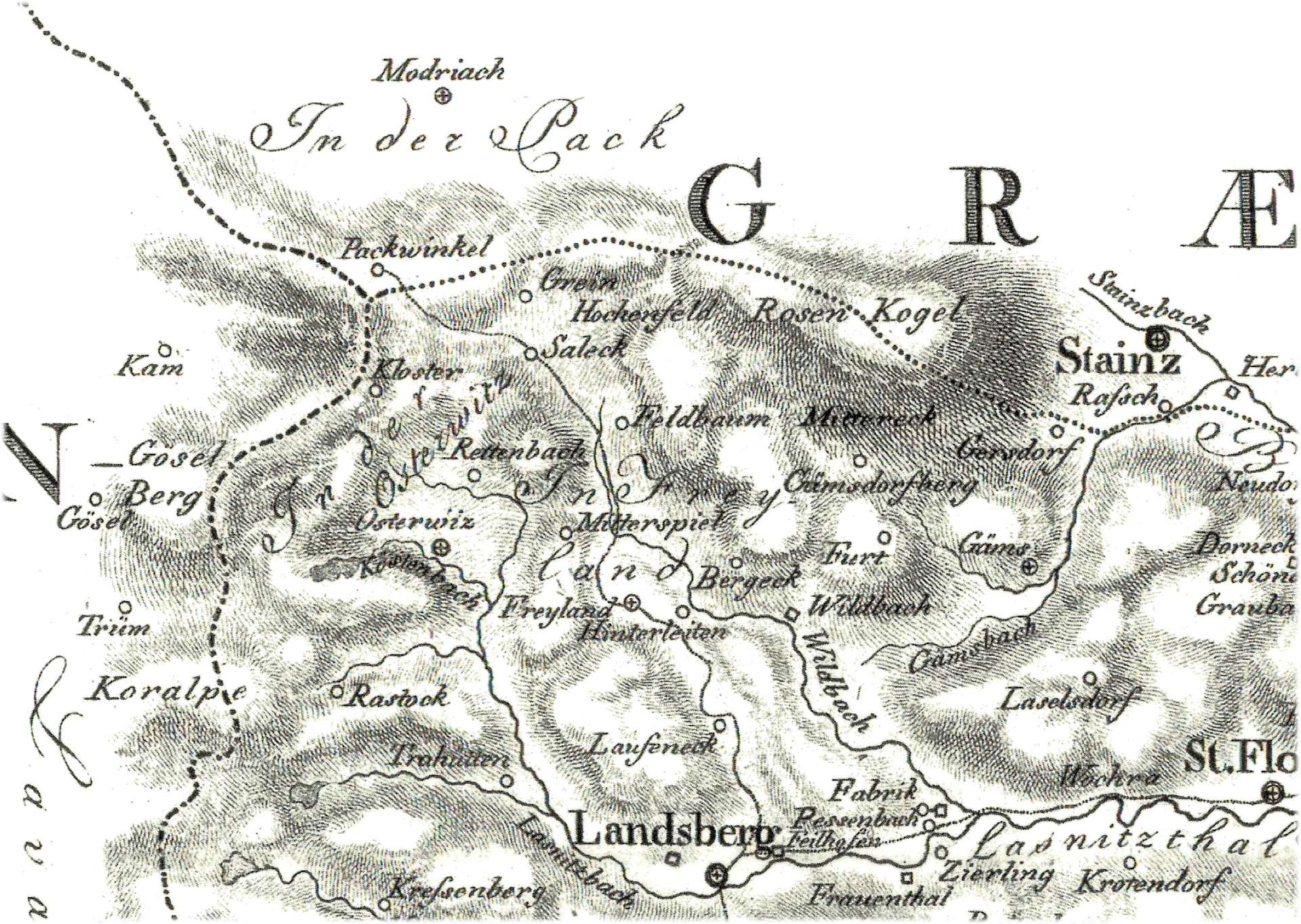 Ausschnitt des Oberlaufs der Laßnitz mit der Gegend "In der Osterwitz" aus: "Der mittlere Theil von Untersteyermark oder der Marburger Kreis" (aufgrund der verschobenen Darstellung muss das kein Beleg dafür sein, das Gebiet der Hebalm wäre im 18. Jh. zu Osterwitz zu rechnen gewesen, allerdings auch kein Indiz dagegen)